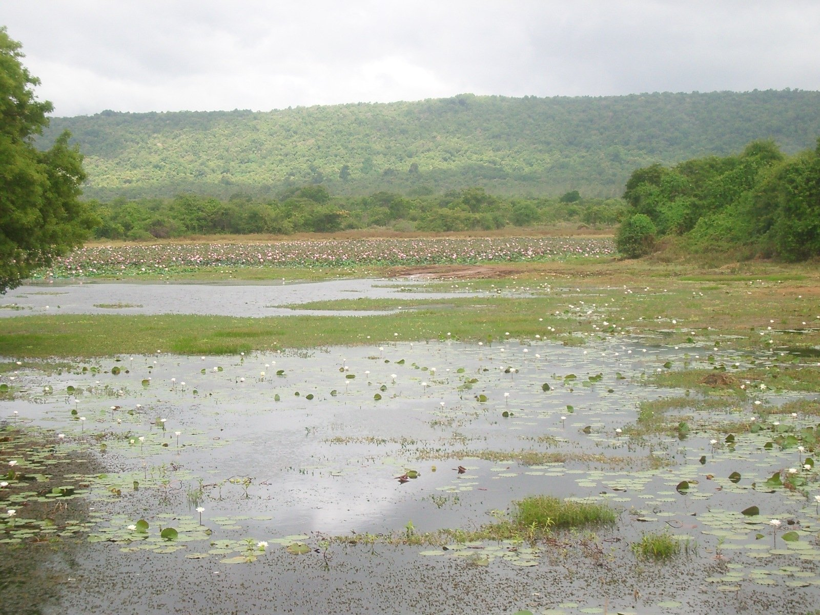 Llac amb flors de lotus prop d'Anuradhapura, foto feta per J. Ollé el juliol del 2006